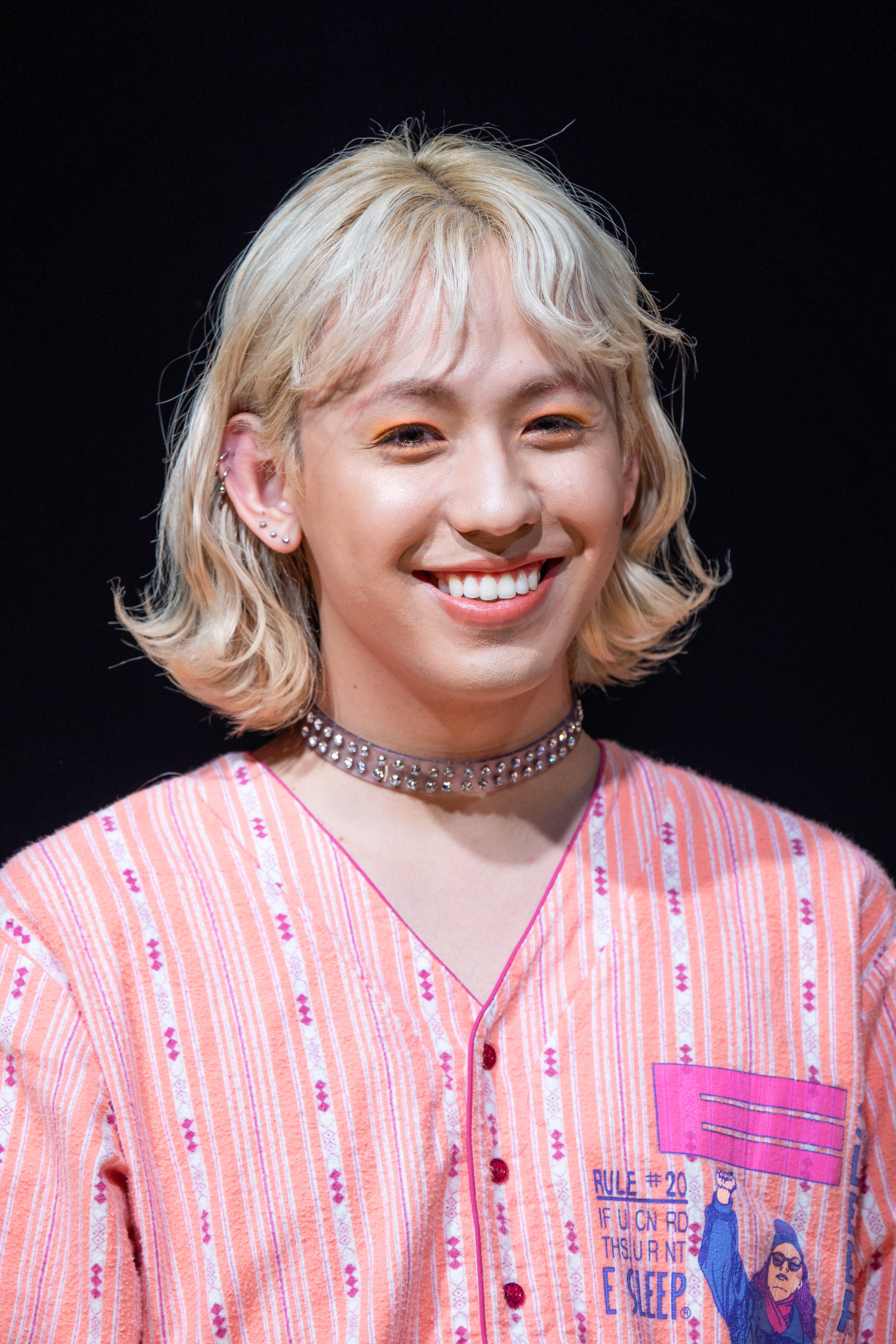 Super! C CHANNEL 2019 りゅうちぇる